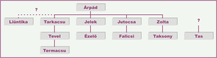 Árpád nagyfejedelem leszármazottai Constantinus Porphyrogennitus szerint